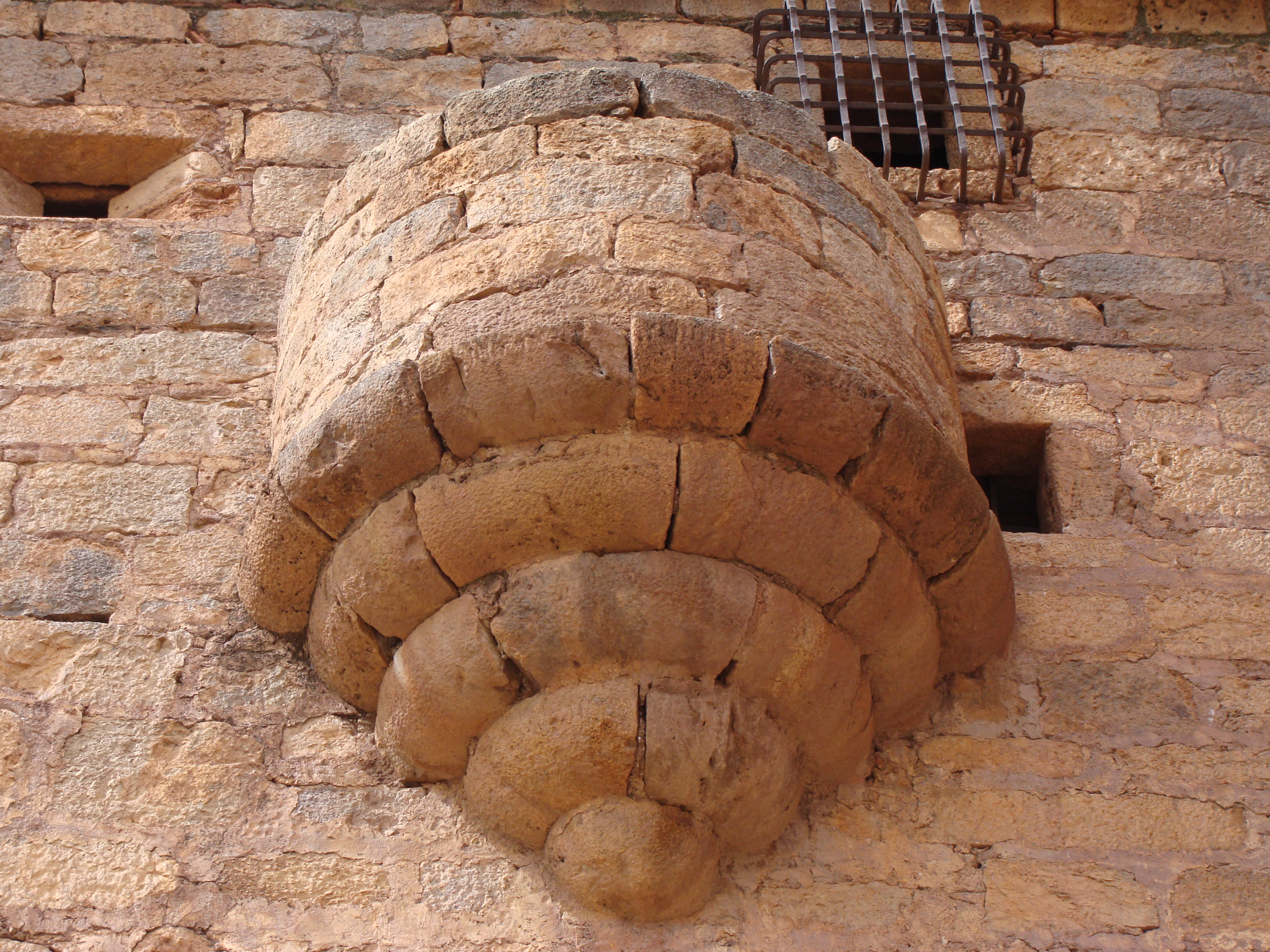 échauguette au château de la Calahorra, Andalousie, Espagne.